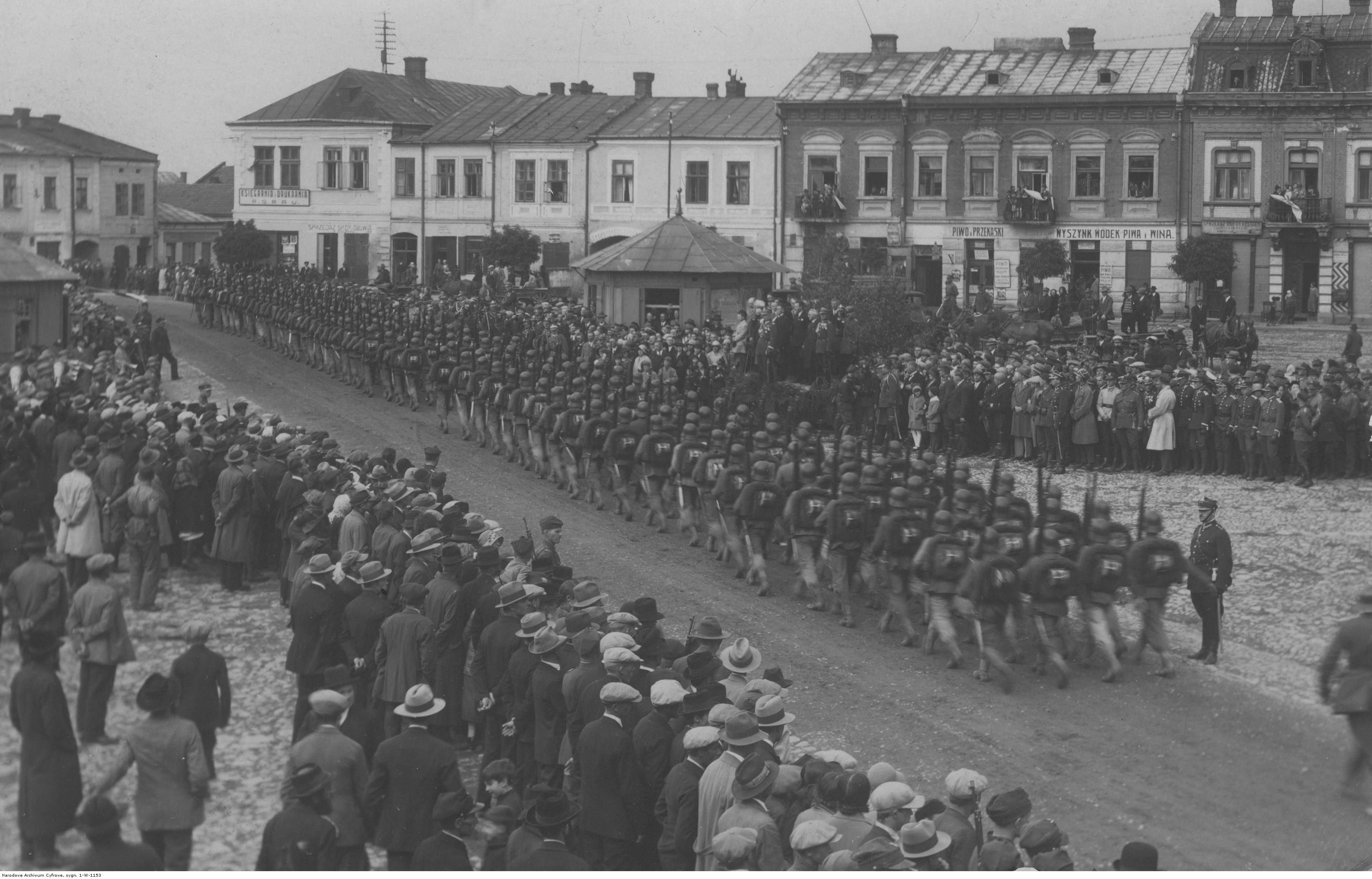 Defilada oddziałów 23 Górnośląskiej Dywizji Piechoty w Mielcu. Koncern Ilustrowany Kurier Codzienny - Archiwum Ilustracji. Sygnatura: 1-W-1153